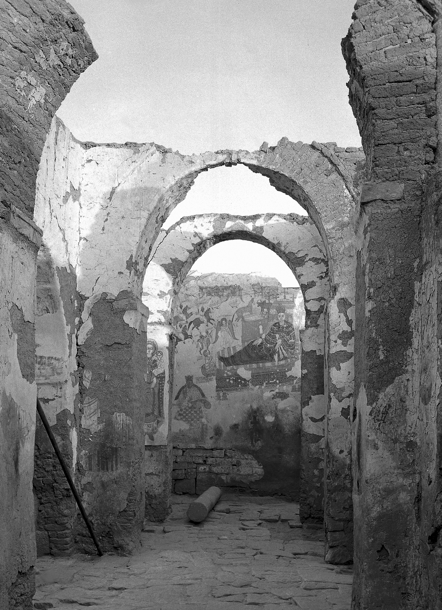 Wykopaliska w Faras